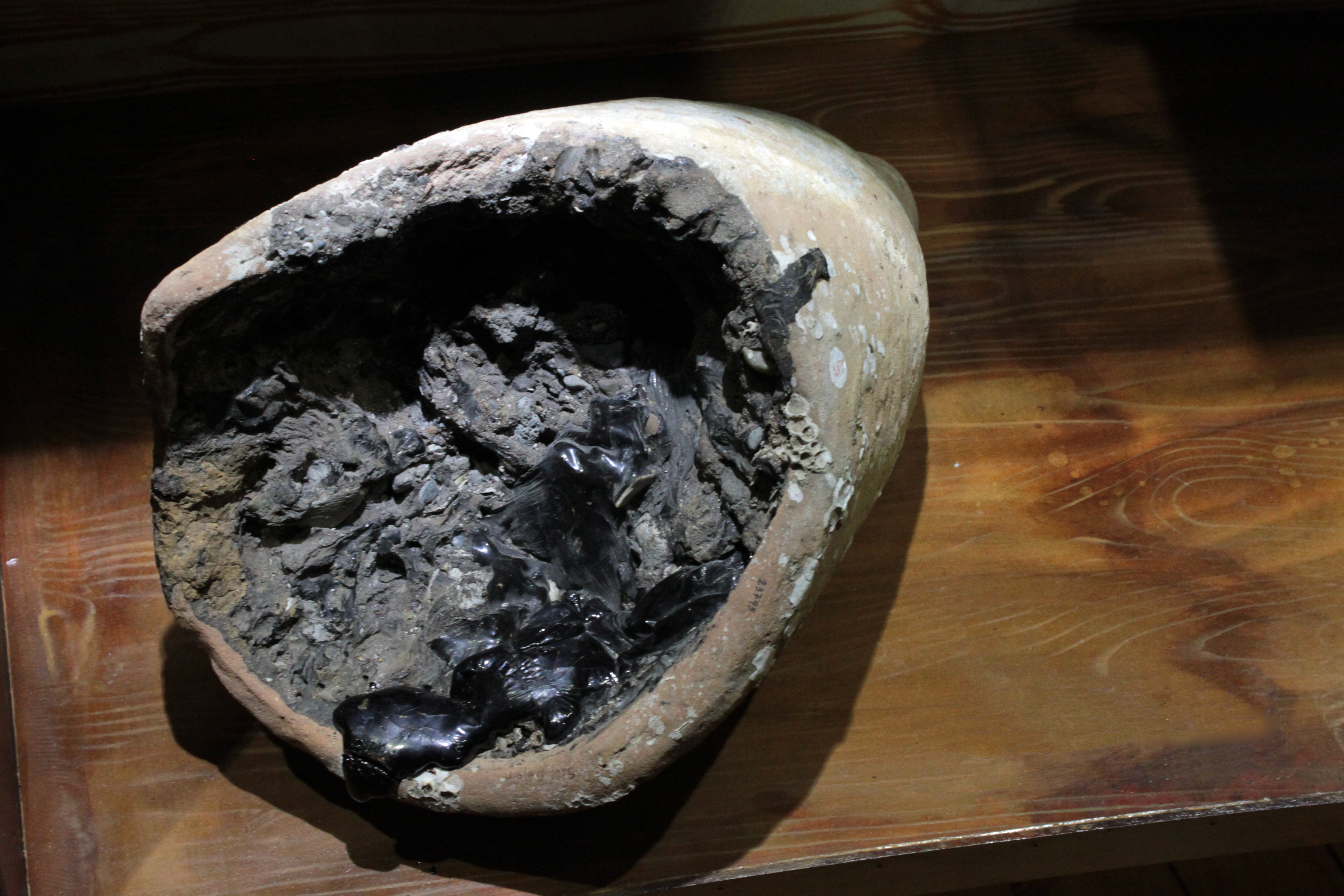 Ánfora con restos de brea localizada en un pecio de la playa de El Saler, Valencia. Depositada en el Museo de prehistoria de Valencia, Comunidad valenciana, España.